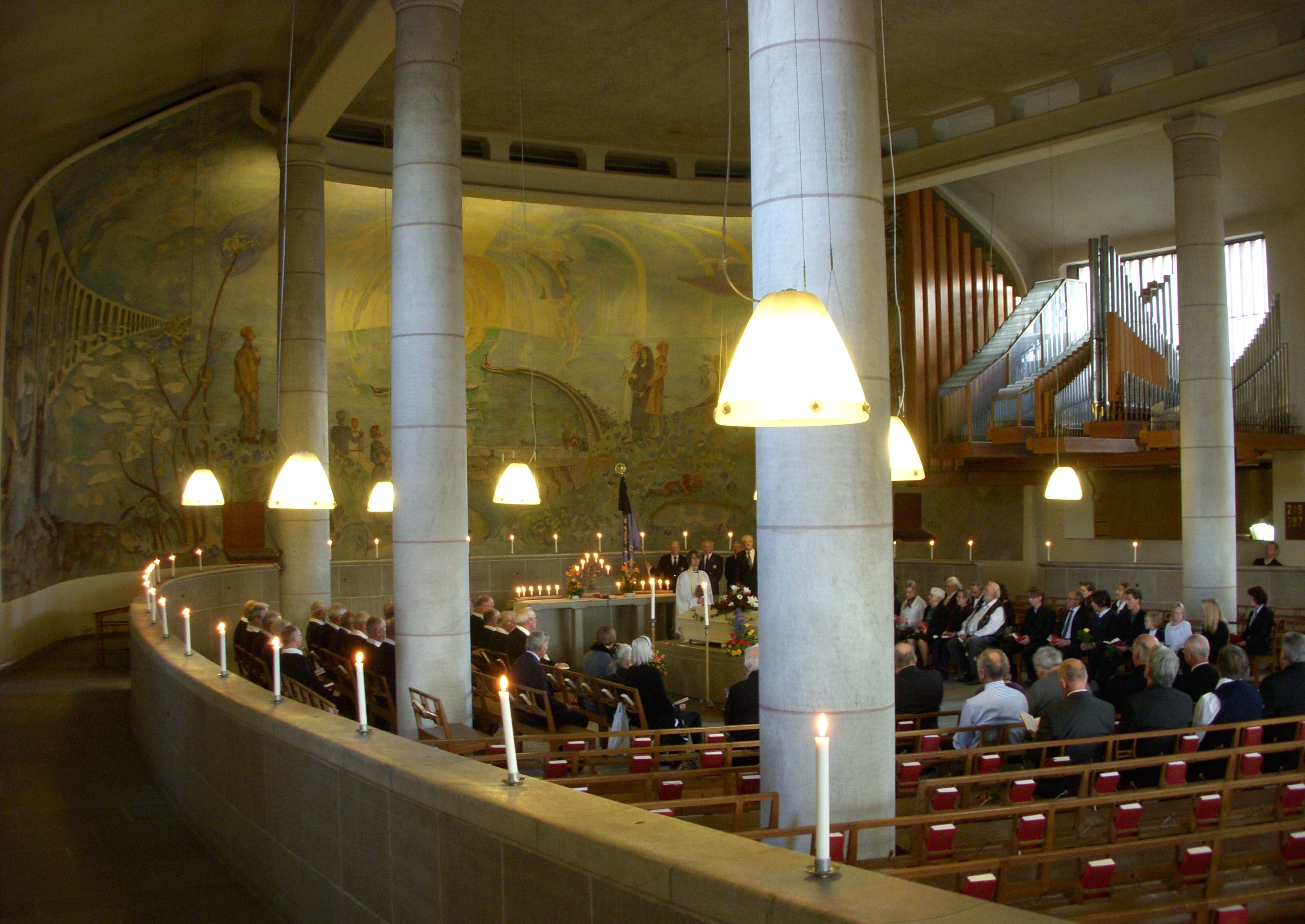 Heliga korsets kapell på Skogskyrkogården i Stockholm